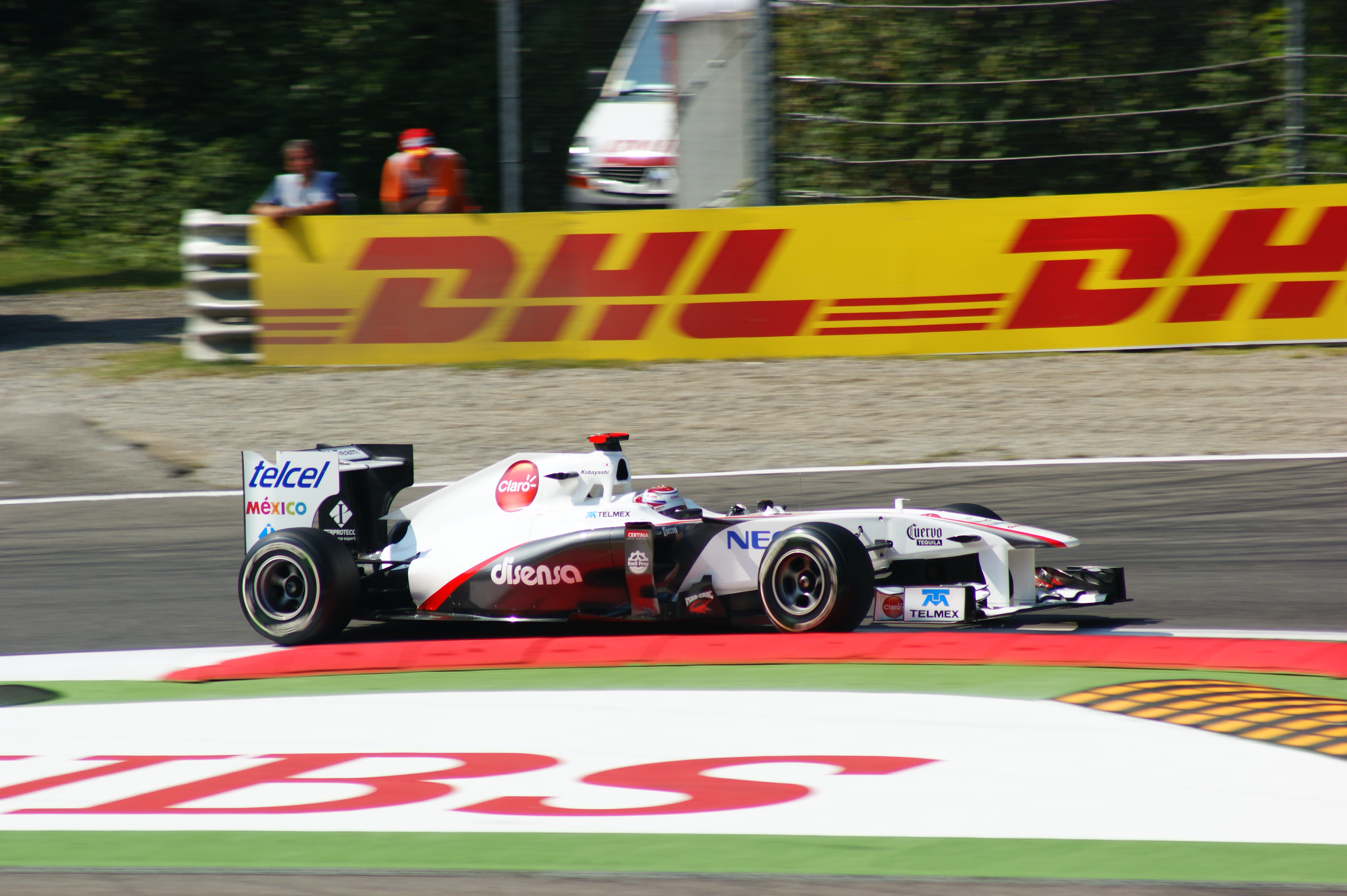 Kamui Kobayashi alla variante della roggia Monza 2011